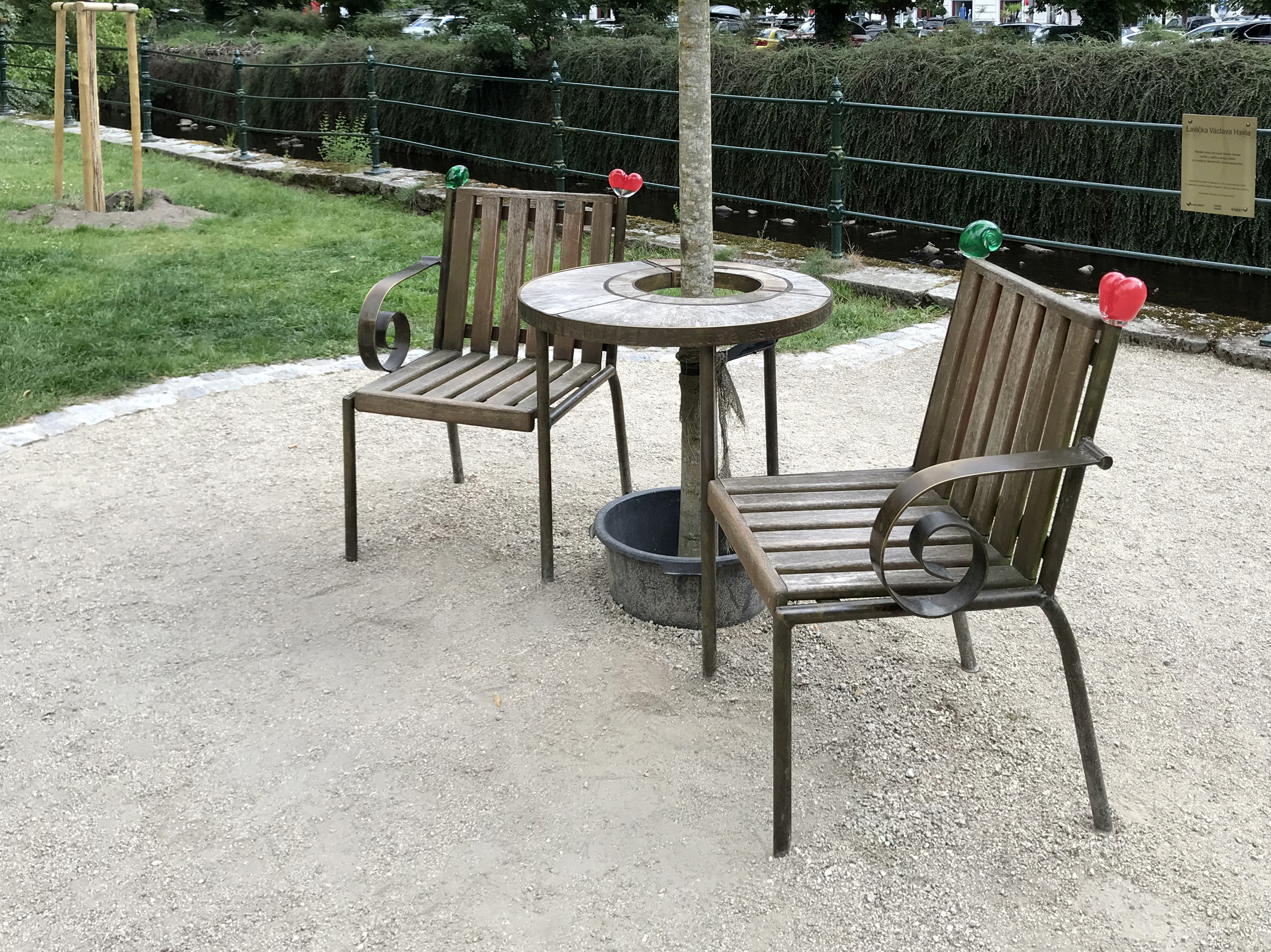 Lavička Václava Havla v Karlových Varech v sadech Karla IV.